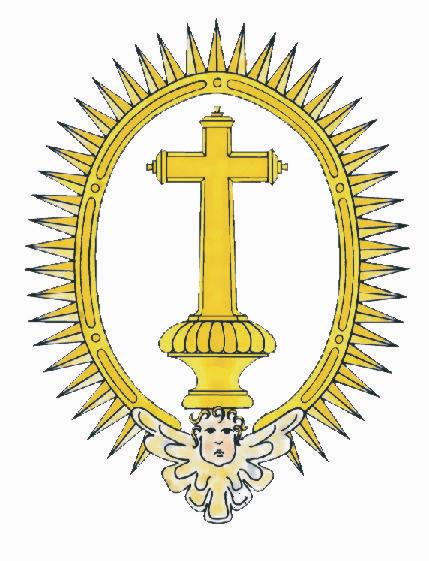 Escudo Franciscana Cofradía del Nazareno